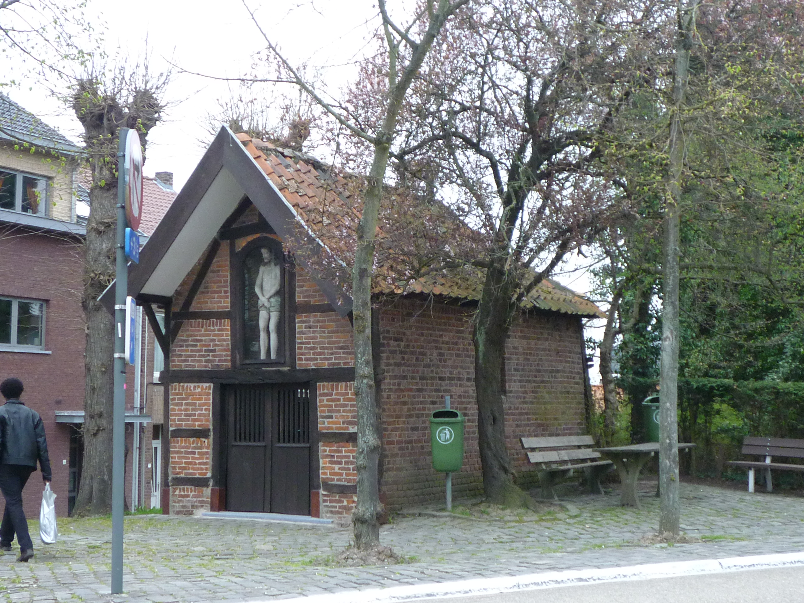 Borgloon Tongersesteenweg zonder nummer